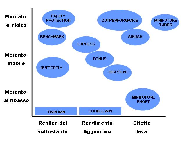 Grafico sul profilo di rendimento dei certificati d'investimento